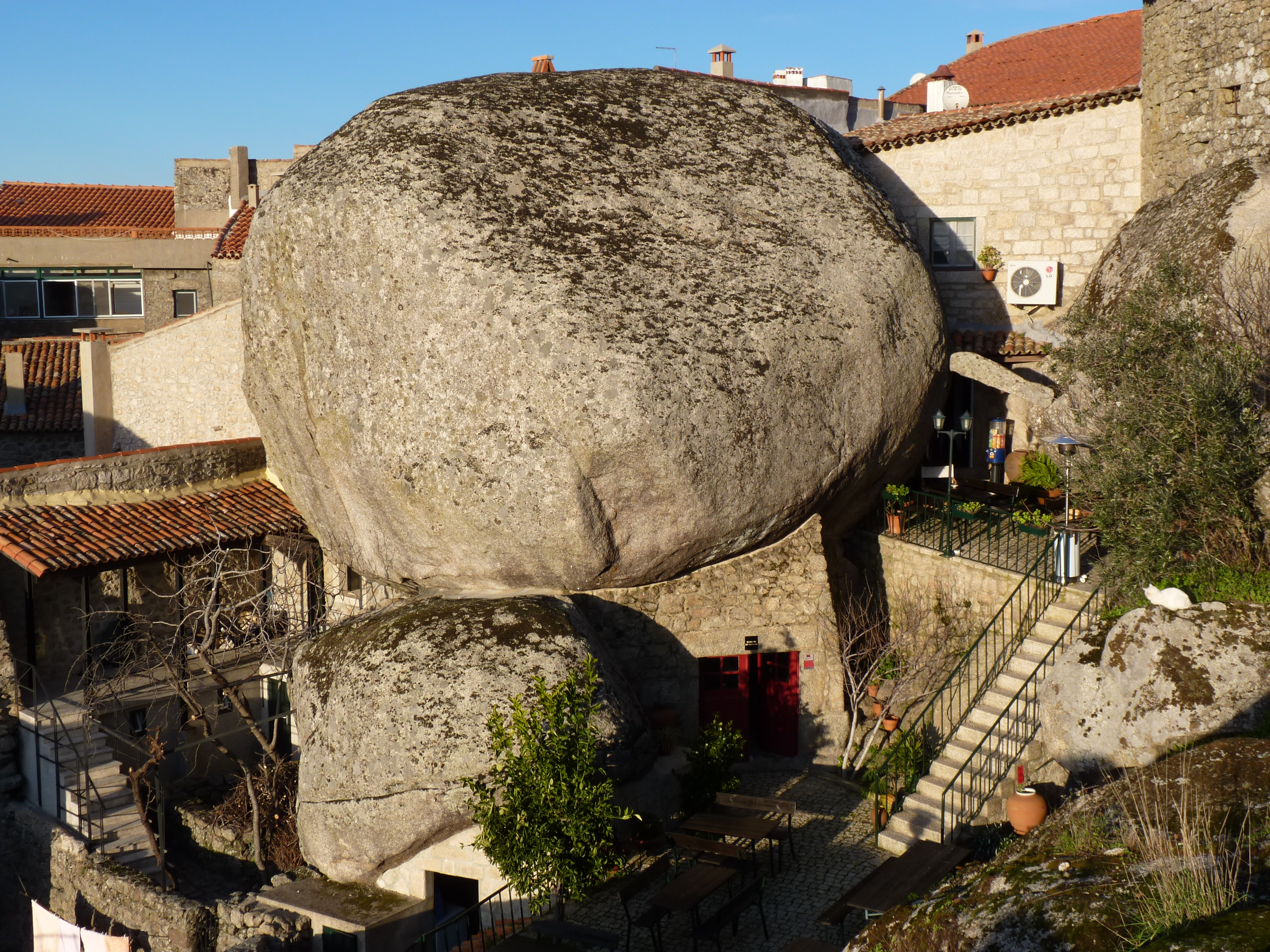 Aldeia Velha de Monsanto This monument is classified as Imóvel de Interesse Público. This file was uploaded for Wiki Loves Monuments in Portugal with the unique identifier 74233.